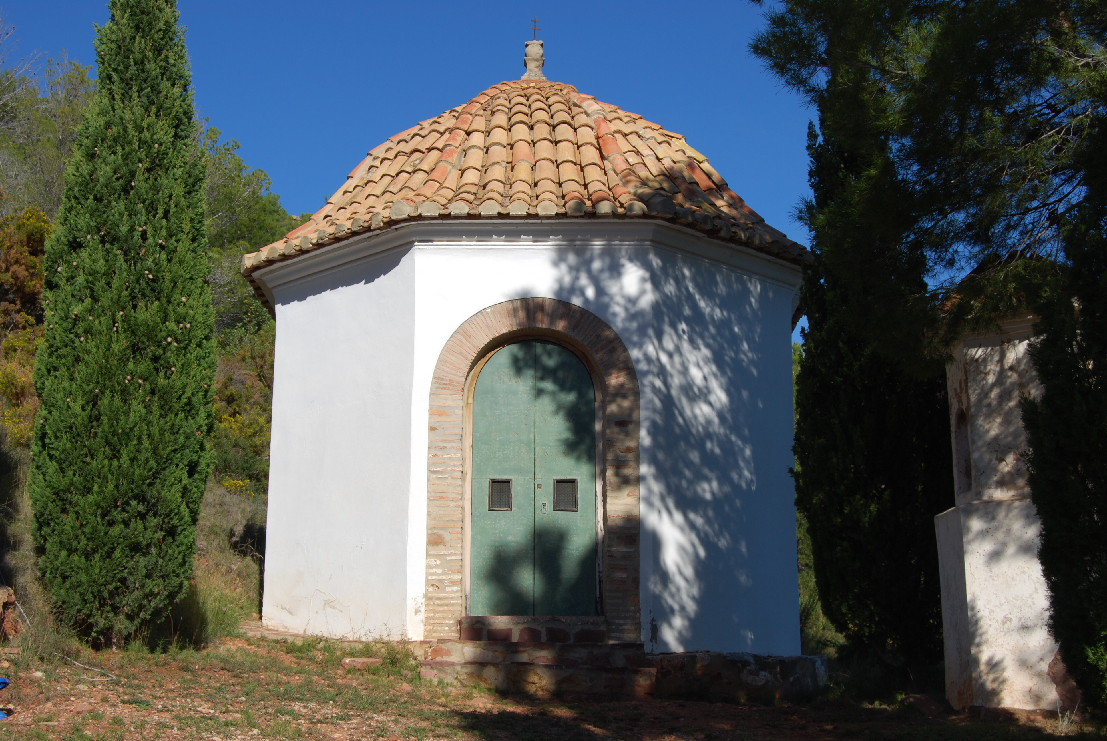 Esta imagen muestra en ermita de Segart / Lavadero de Segart